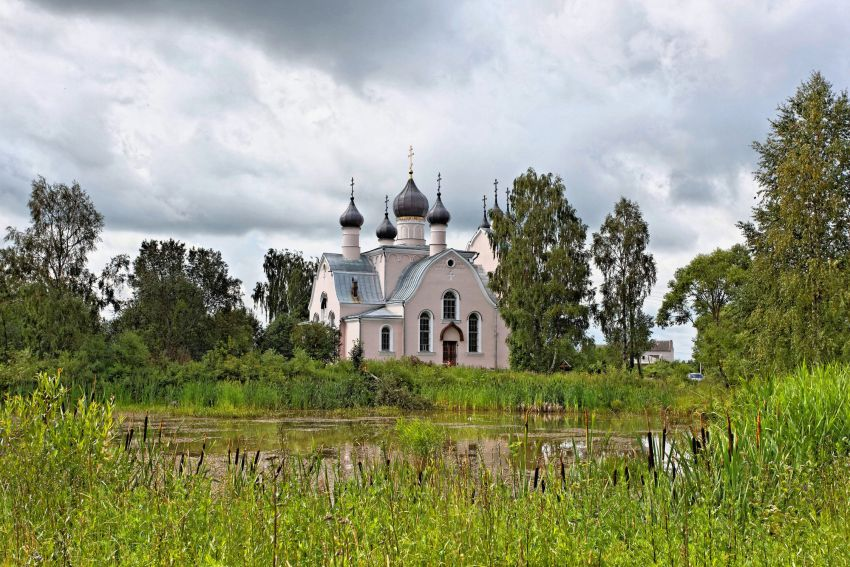 Лето 2016 года